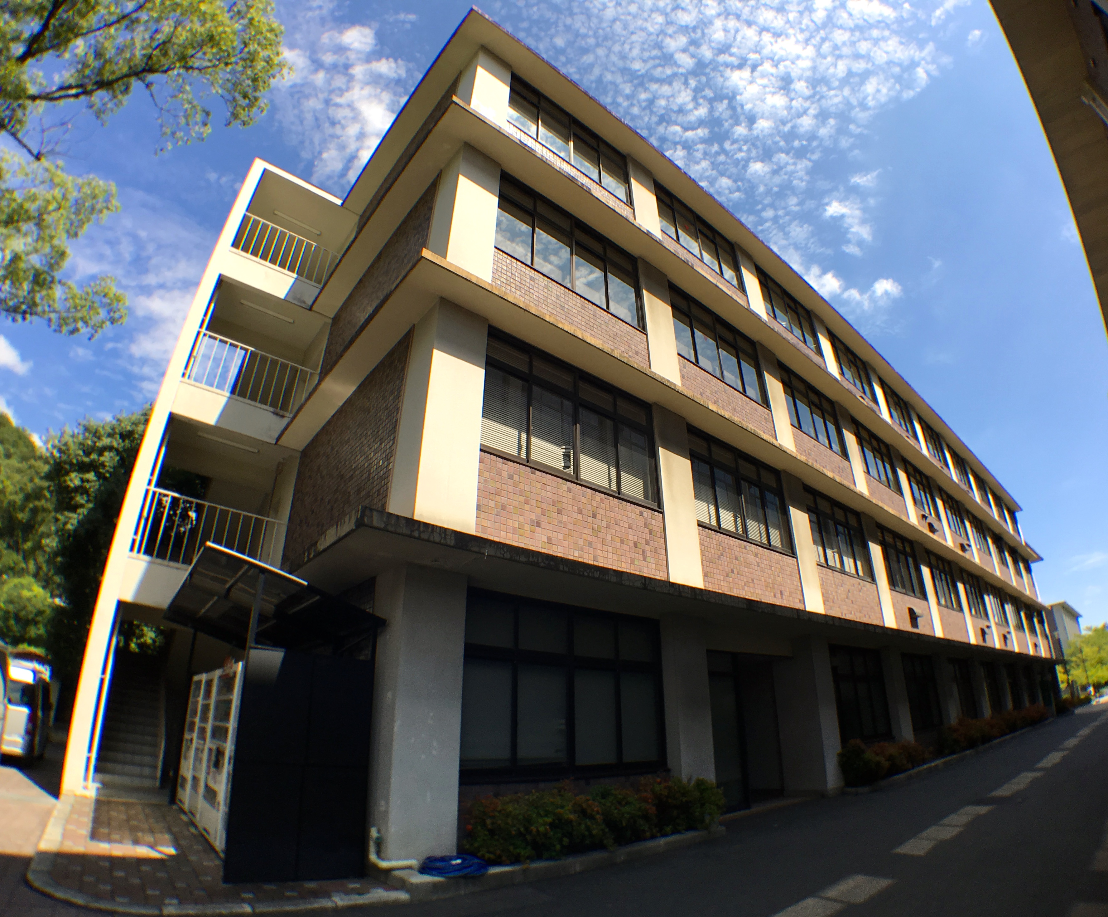 The photo was taken by me on September 10, 2016.